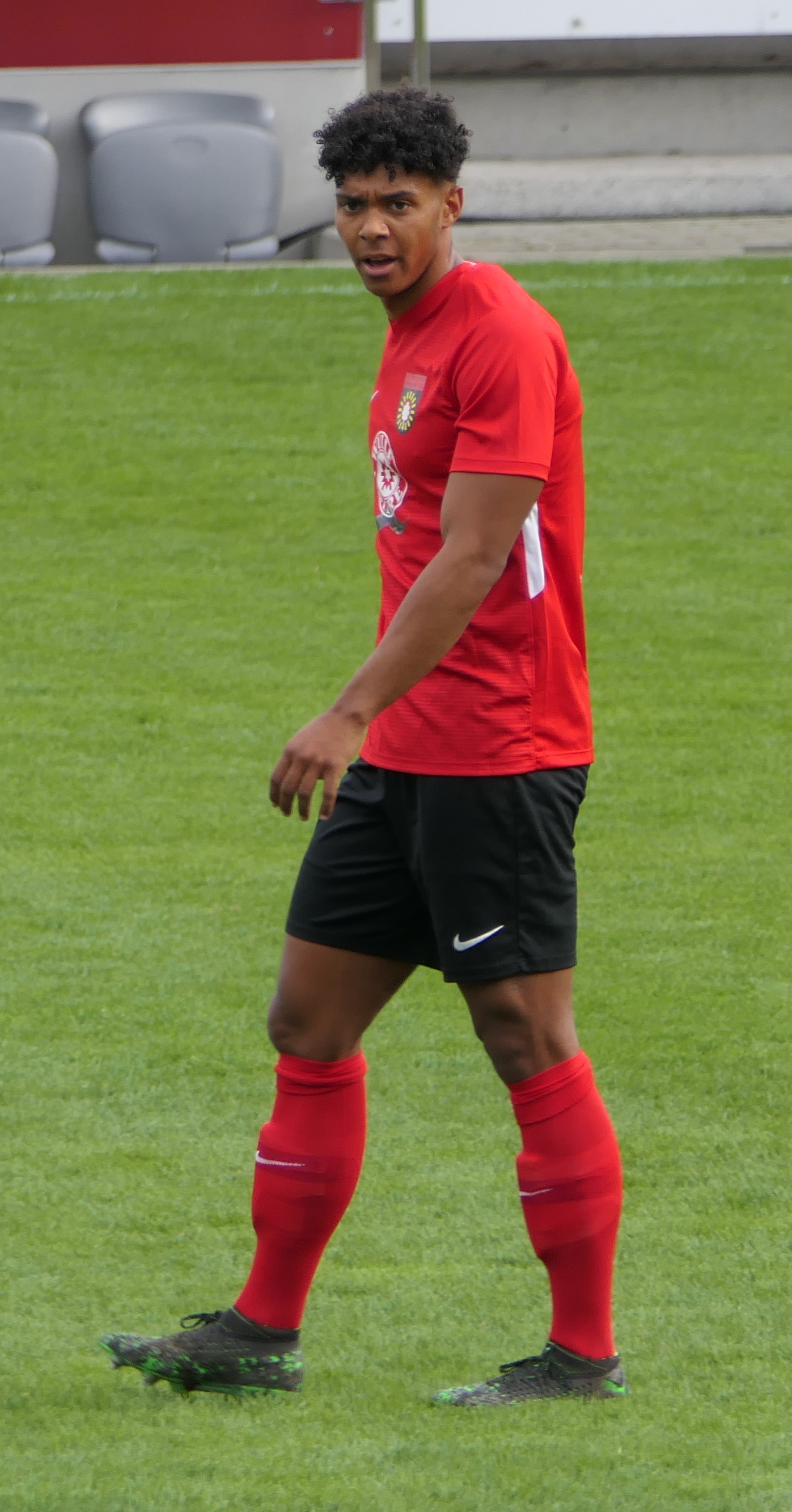 Der Fussballprofi Niklas Sommer im Trikot der SG Sonnenhof Großaspach beim Heimspiel gegen Eintracht Braunschweig am 27.10.2019.